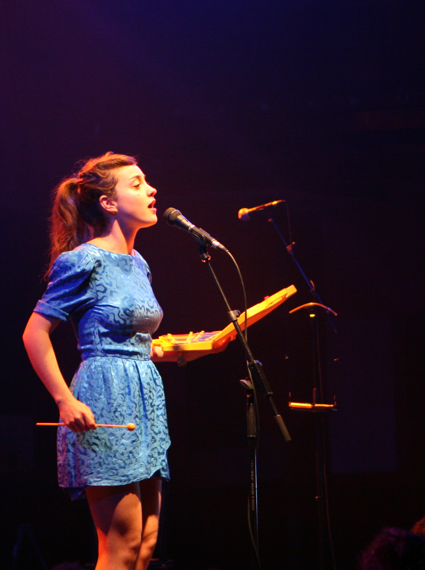 Russian Red en la Sala Apolo de Barcelona el 21 de Febrero de 2009.